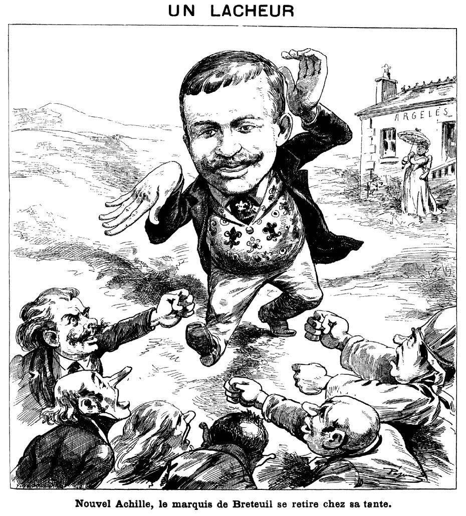 "Un lâcheur. Nouvel Achille, le marquis de Breteuil se retire chez sa tante."